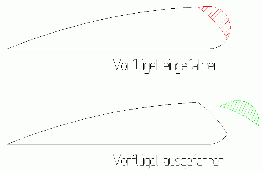 Schema eines Vorflügels.